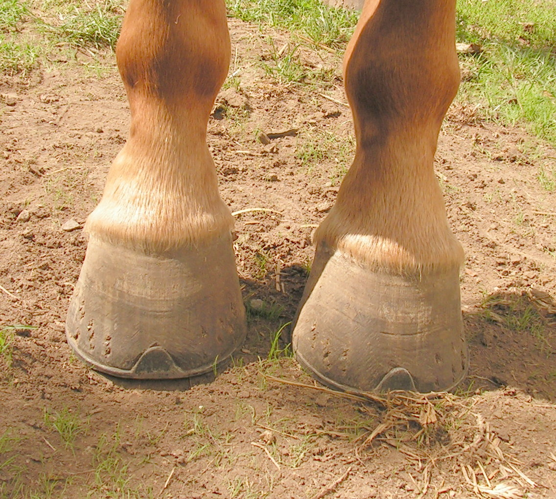 Septembre 2006